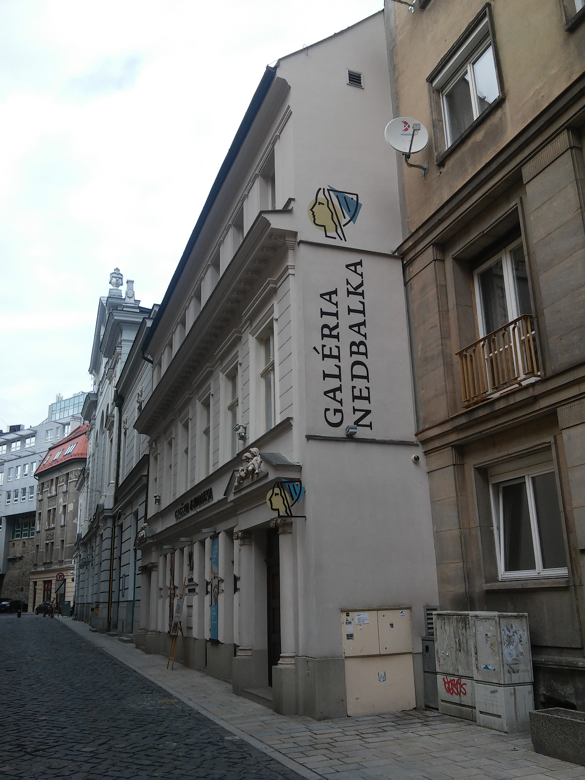 Galéria Nedbalka, Bratislava